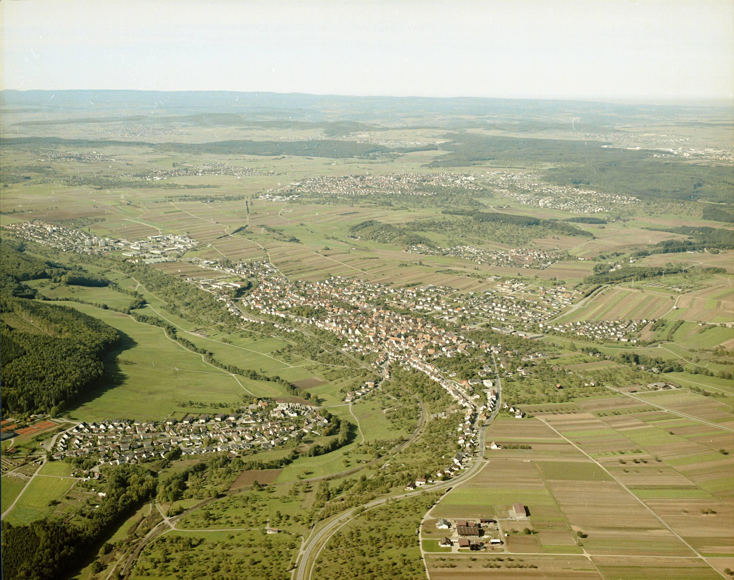 Luftbild von Weil im Schönbuch - Staatsarchiv Sigmaringen - Archivalieneinheit N 1/96 T 1 Nr. 511